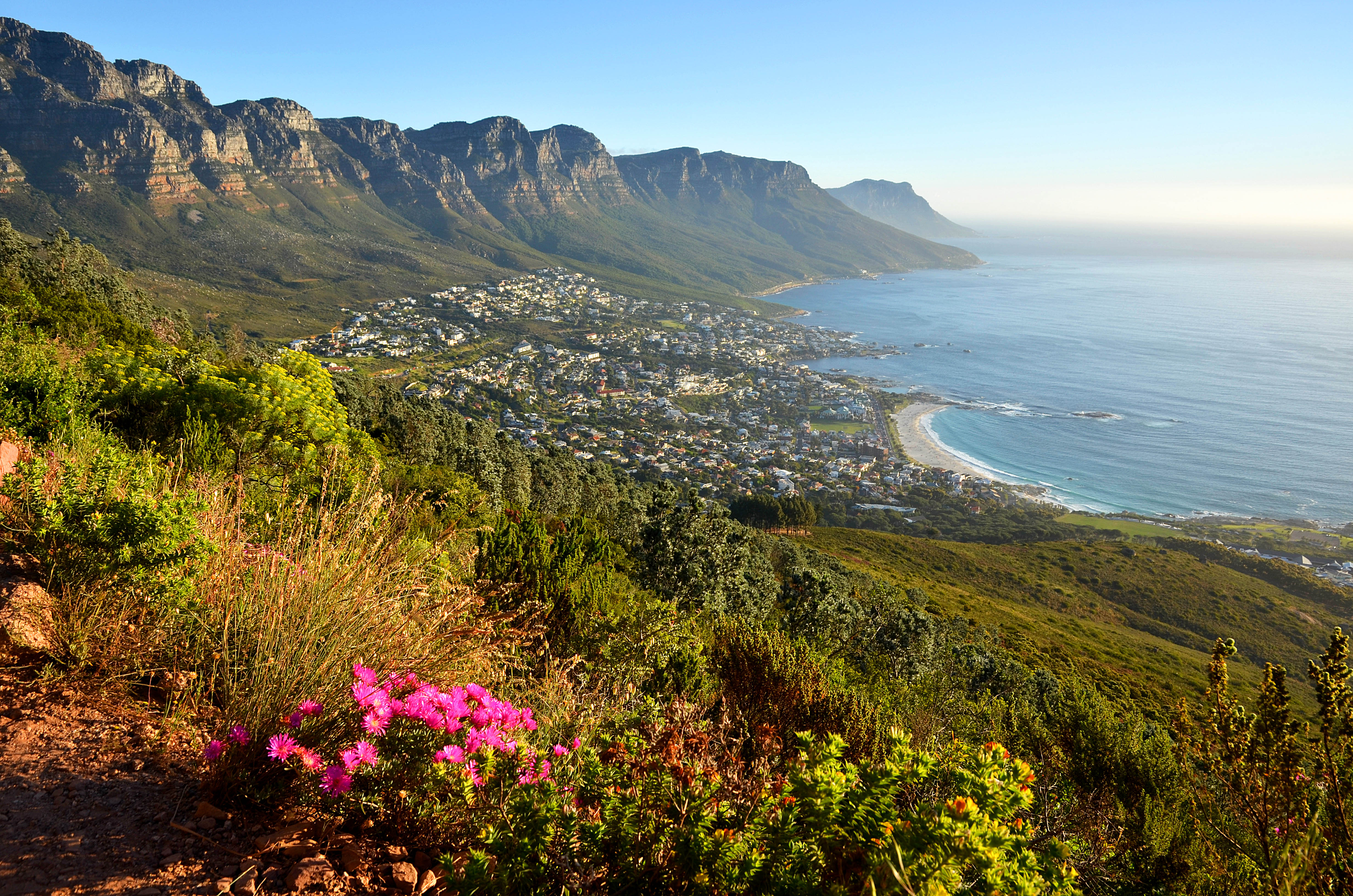 12 apoštolů cestou na Lions Head - Signal Hill, Kapské Město, Jihoafrická republika